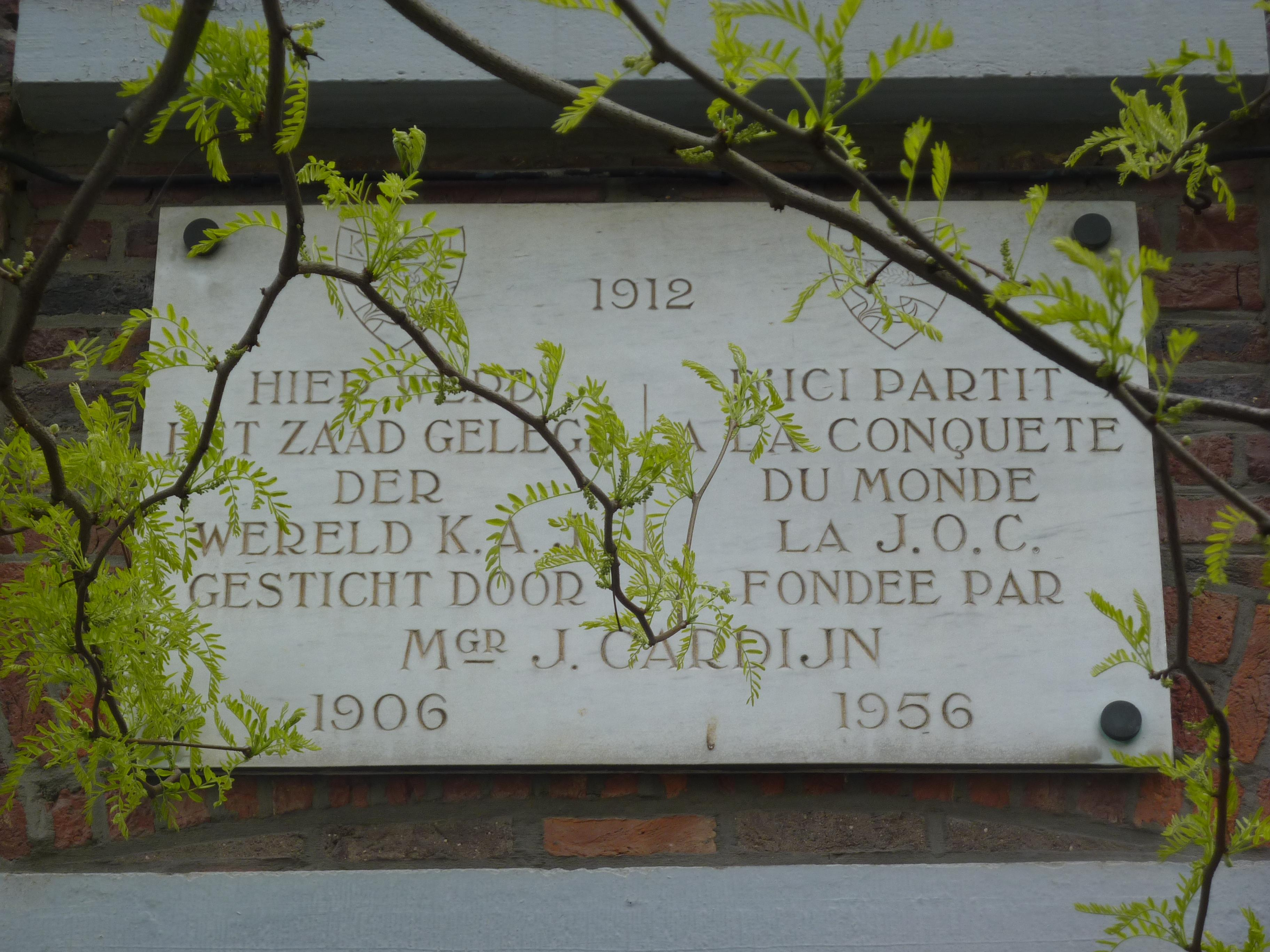 La Jeunesse Ouvrière Chrétienne (J.O.C.) fondée par Joseph Cardijn.